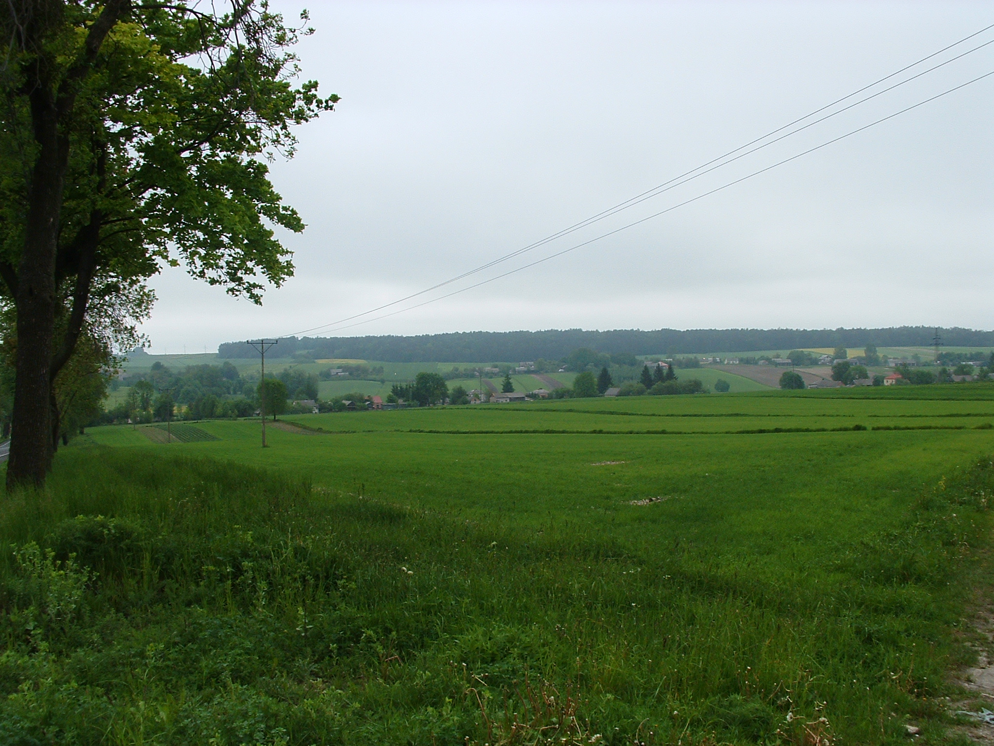 Sumin (powiat tomaszowski, gmina Tarnawatka)